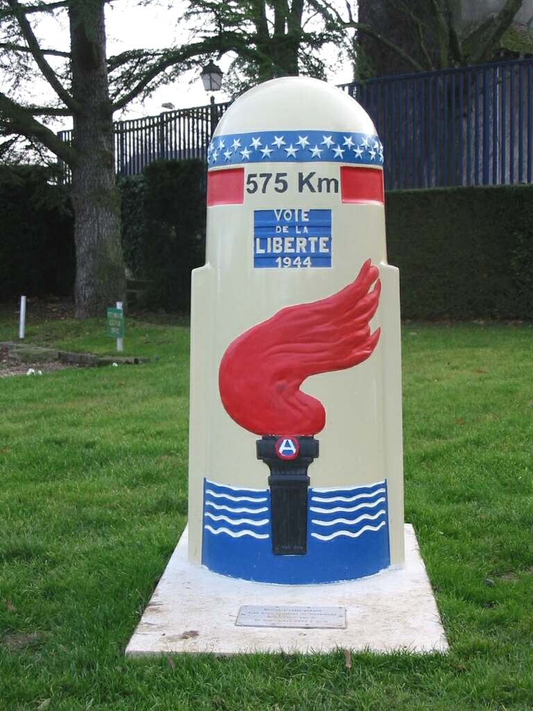 Borne commémorant la libération d'Épône (France) en 1944, située dans le parc du château à Épône